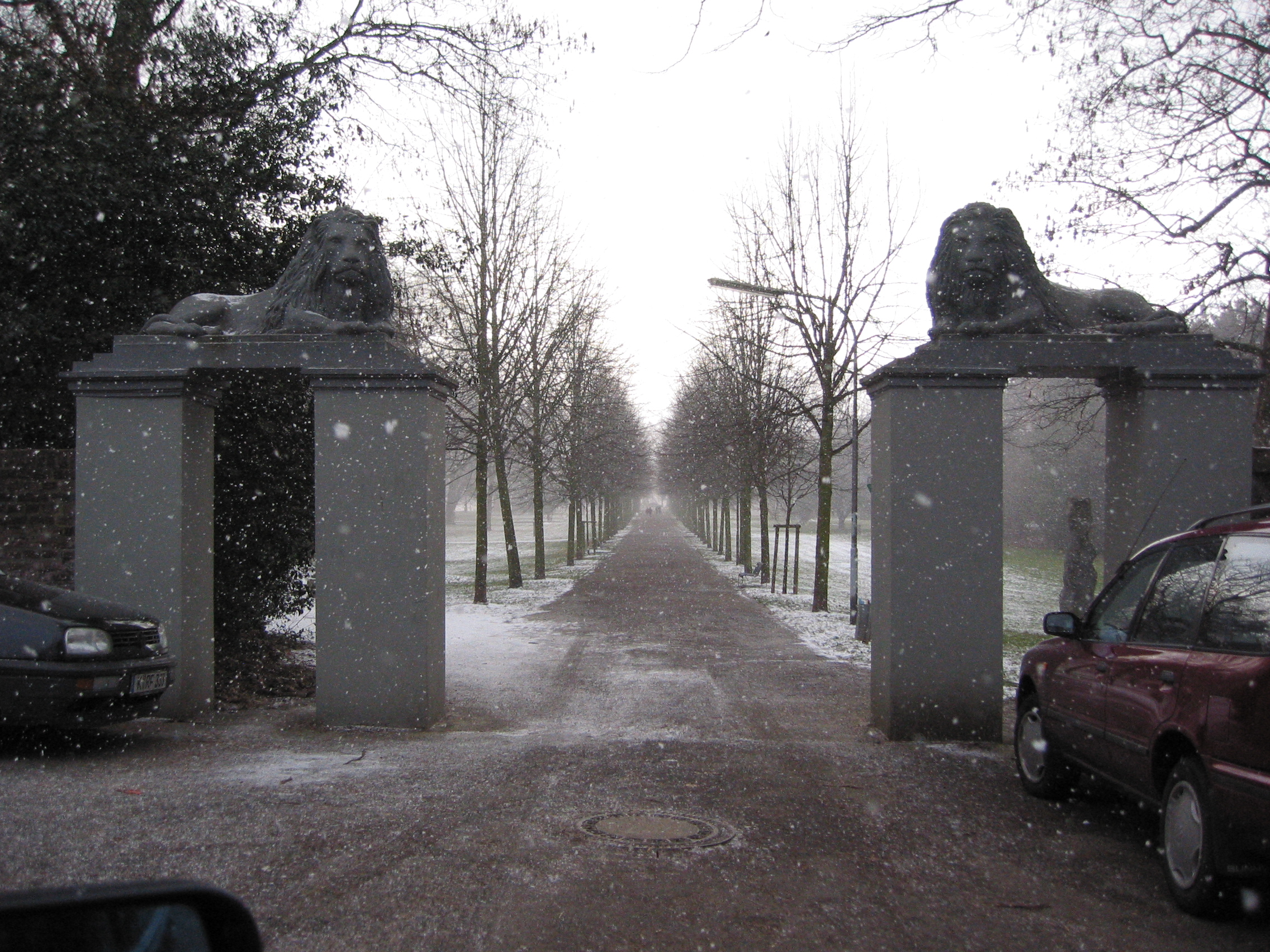 Köln-Stammheim, Germany: Eingang zum Schlosspark